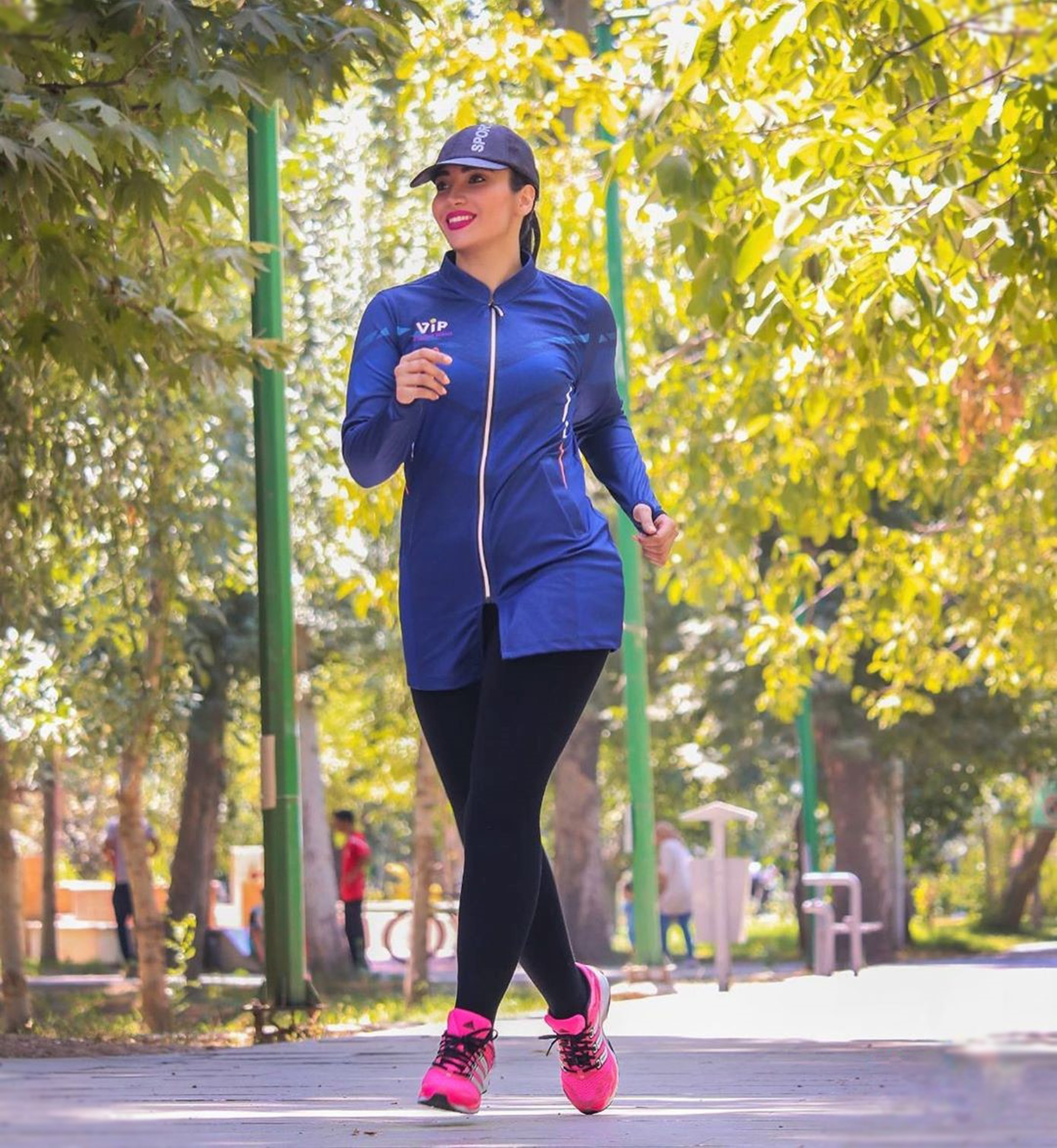 مدل و طراح فشن ایرانی، سارا آهنگی در باغ فاتح ، همچنین دارای سابقه کار در کرج. من عکاس این تصویر هستم و این تصویر را شما می توانید به شکل رایگان و بدون هیچ شرطی برای هر منظوری استفاده کنید. استفاده تجازی هم آزاد است و مانعی ندارد. لطفا پایین را ببینید برای اطلاعات بیشتر. خود مدل می تواند از تصاویر استفاده کند اما با همین مجوز ذکر شده در صفحه.